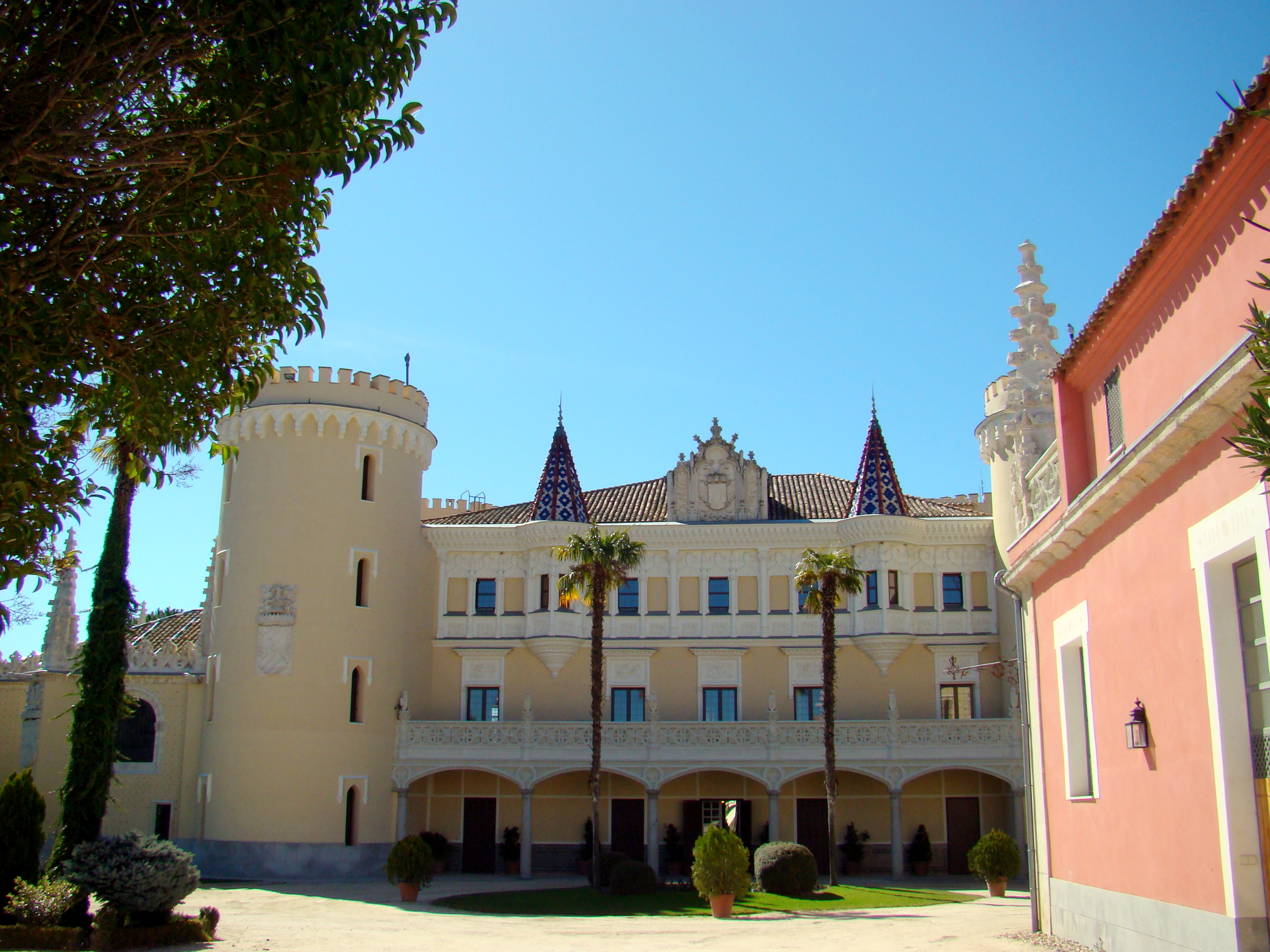 Castillo de Viñuelas, Madrid, España.